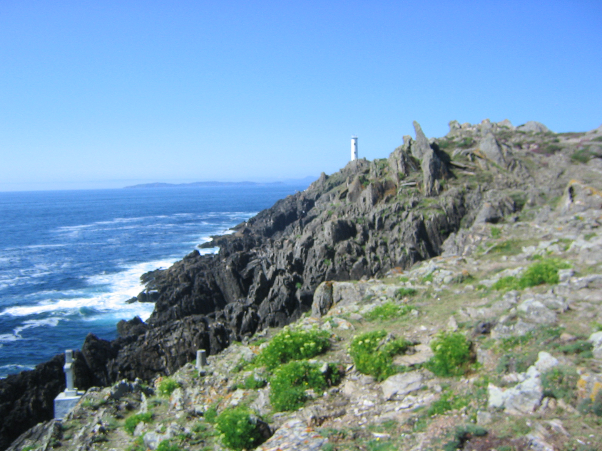 Cangas do Morrazo, cabo Home. Pontevedra Galicia España.